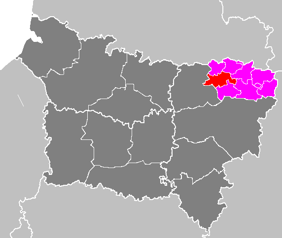 Maps of arrondissements and cantons of France: Arrondissement de Vervins - Canton de Guise.PNG